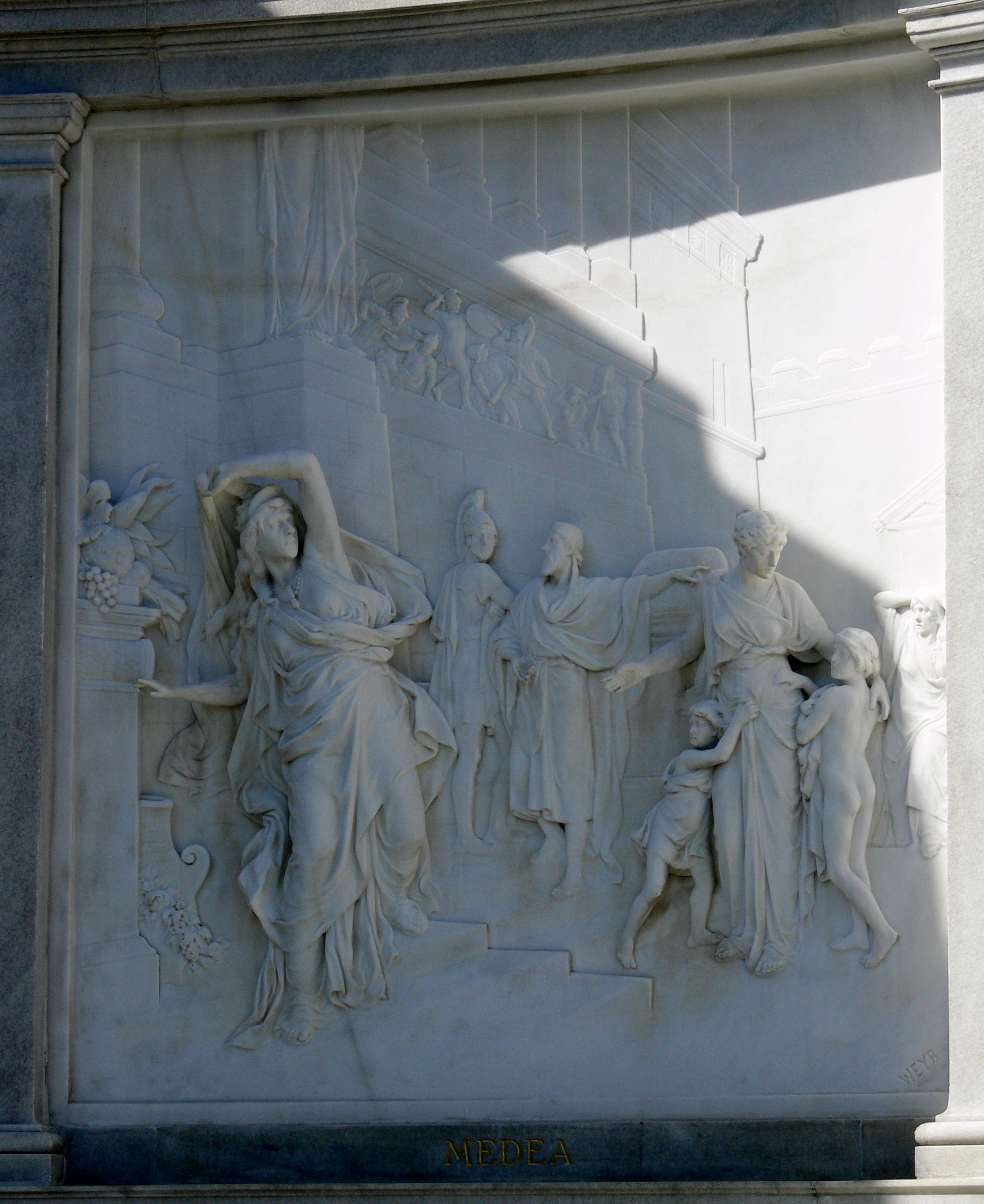 Grillparzer-Denkmal im Volksgarten, Wien, 1889 Relief "Medea" von Rudolf Weyr